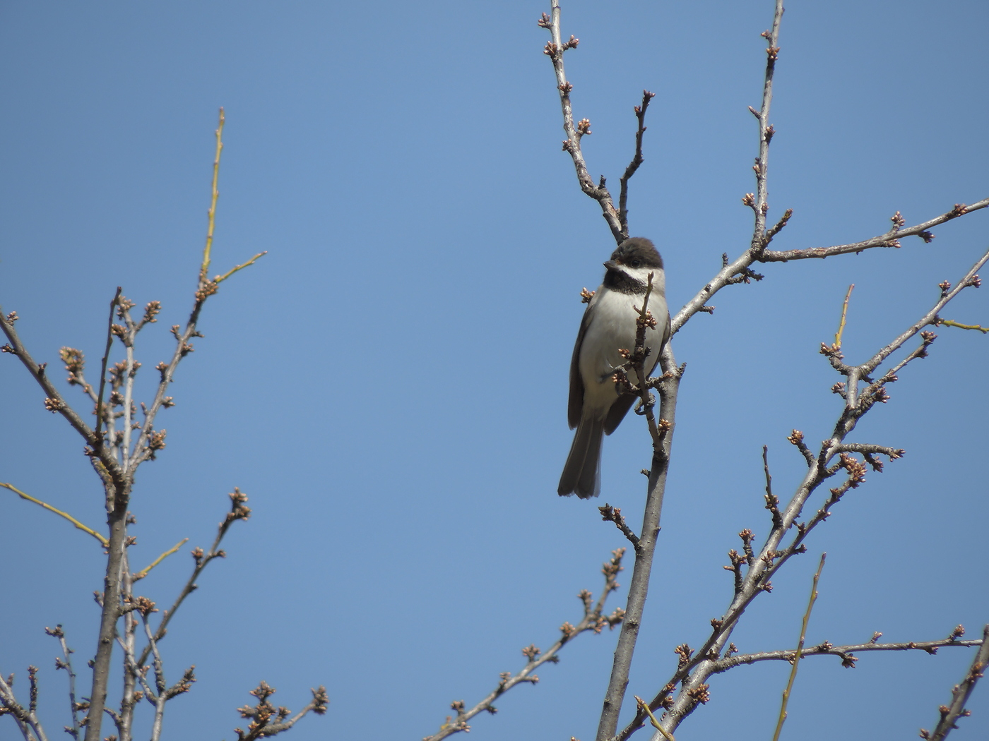 Srpski naziv senica šljivarka Opis vrste D.t. 13-14 cm. Rasprostranjena je na Balkanskom poluostrvu, Maloj Aziji i delovima bliskog istoka. Stanarica je. Naseljava mediteranska i submediteranska područja sa otvorenim listoadnim ili mediteranskim šumama i šikarama, voćnjacima i živicama, uglavnom u pobrđu, nižim planinama ili klisurama. Gnezdi se u dupljama drveća. Hrani se insektima, njihovim larvama i drugim beskičmenjacima, kao i semenjem biljaka. U Srbiji je redovna gnezdarica pobrđa i brdskih predela južno od Save i Dunava čija se populacija procenjuje 7.000-13.000 gnezdećih parova (Puzović et al 2009). Status zaštite vrste IUCN crvena lista - Kategorija LC; Ptice od posebnog značaja za zaštitu u Evropi: Non SPEC e; Konvencija o očuvanju evropske divlje flore i faune i prirodnih staništa - Annex I; Pravilnik o proglašenju i zaštiti strogo zaštićenih i zaštićenih divljih vrsta biljaka, životinja i gljiva: Prilog I Strogo zaštićene divlje vrste biljaka, životinja i gljiva